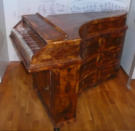 Clavecin anonyme, facture autrichienne vers 1680-1700 - Prague, Národní muzeum